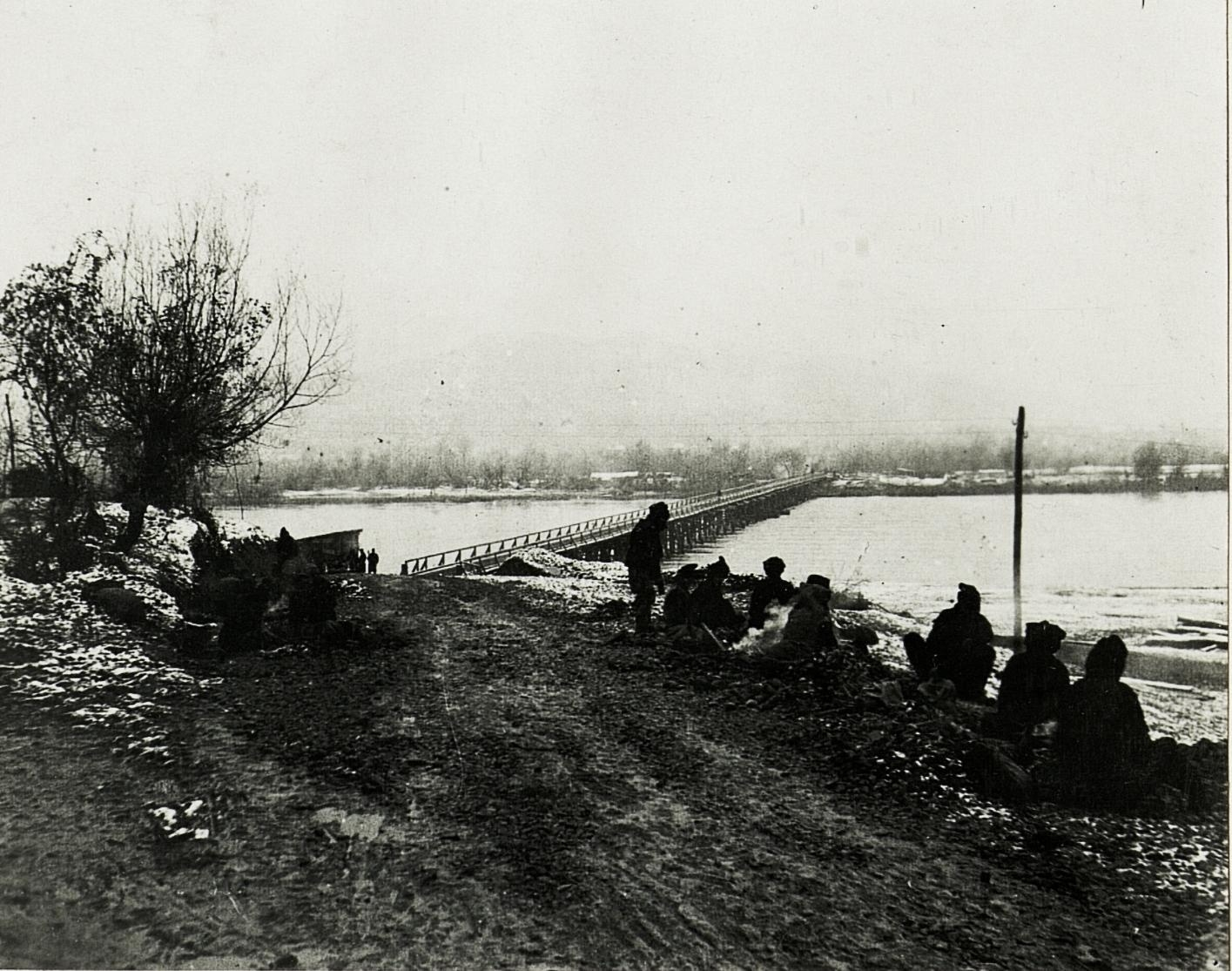 Kriegsbrücke über die Drina bei Kozluk.